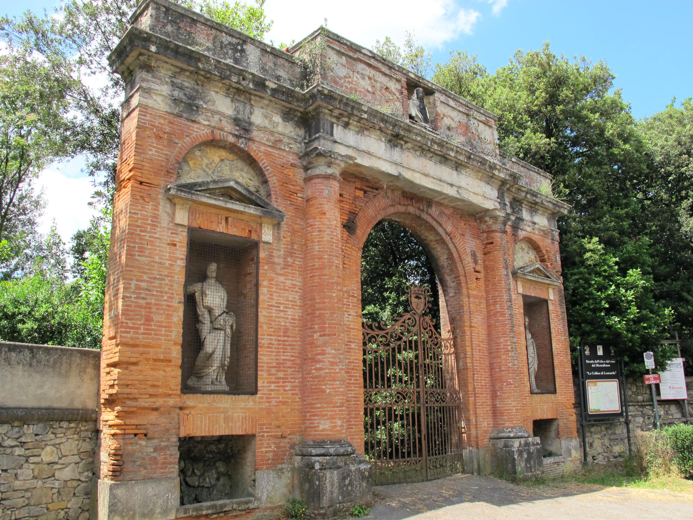 Villa la magia, ingresso monumentale